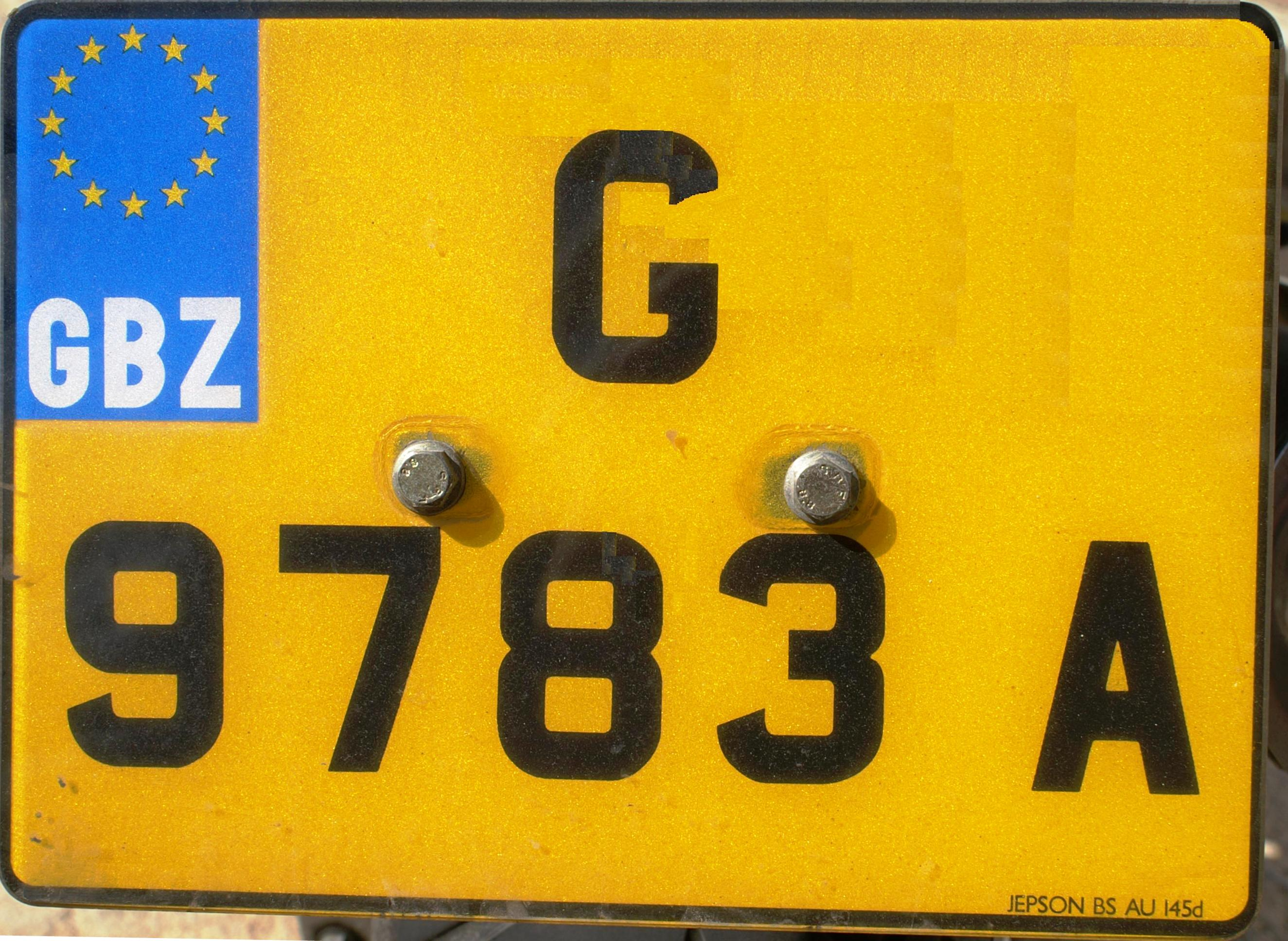 kentekenplaat Gibraltar